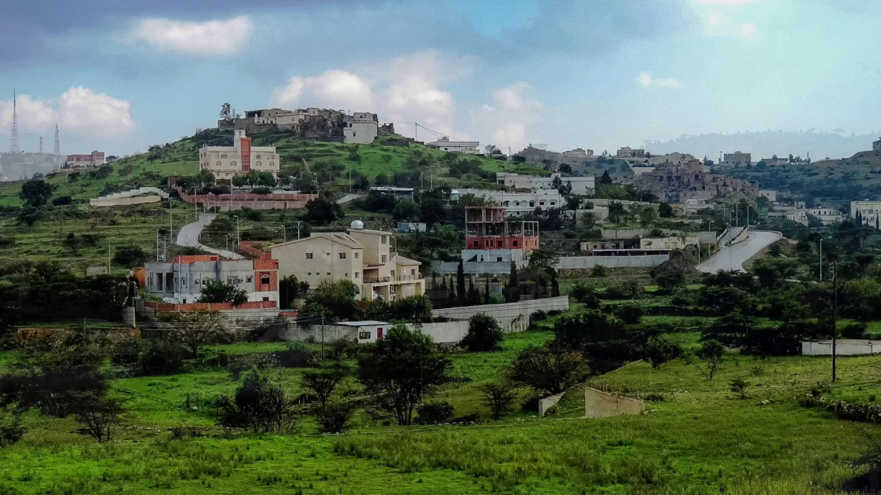 صورة من قرية الطرفين التابعة لبني ظبيان